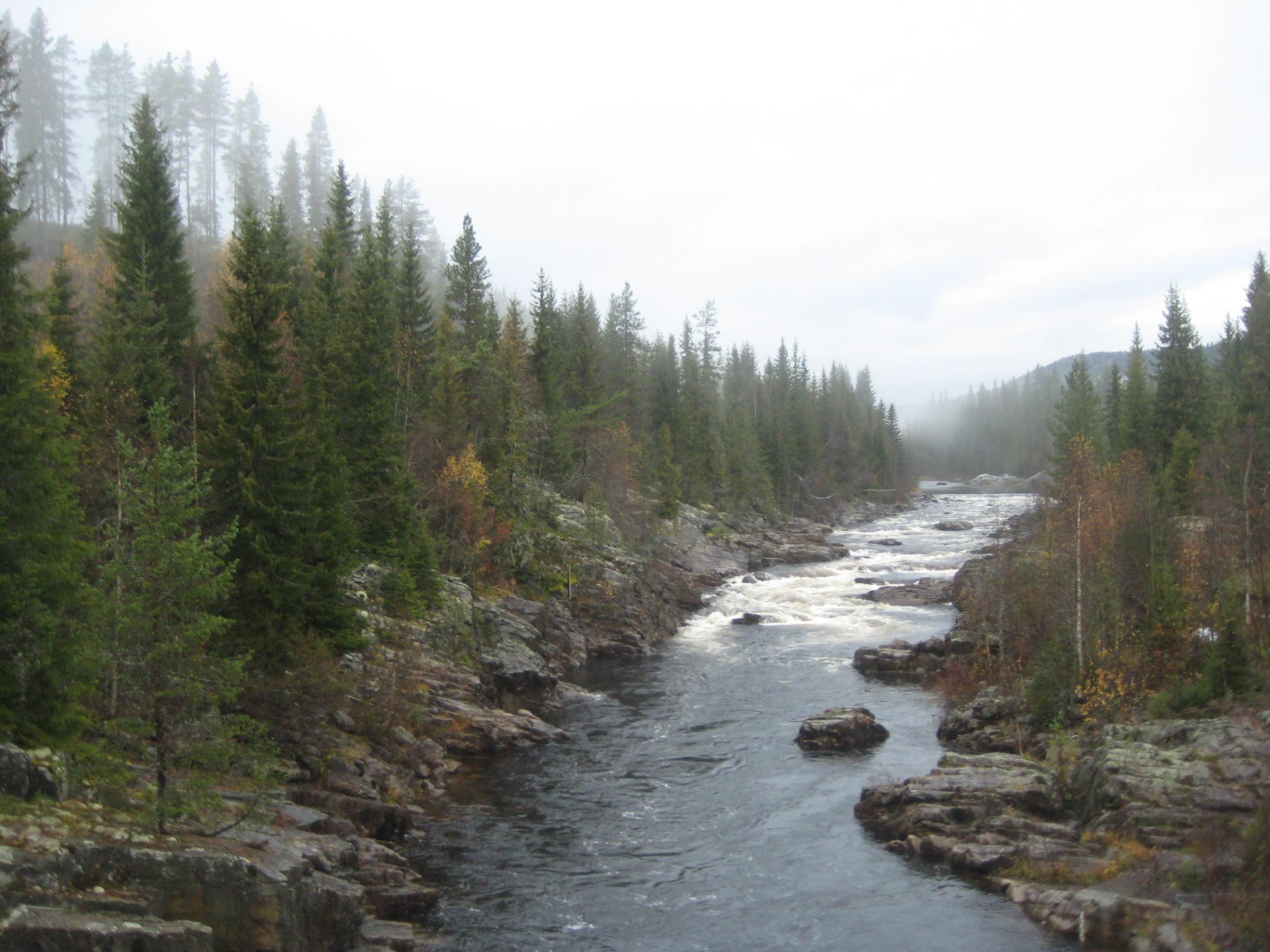 Dokkaelva. Fotografert fra Grønvold Bru.